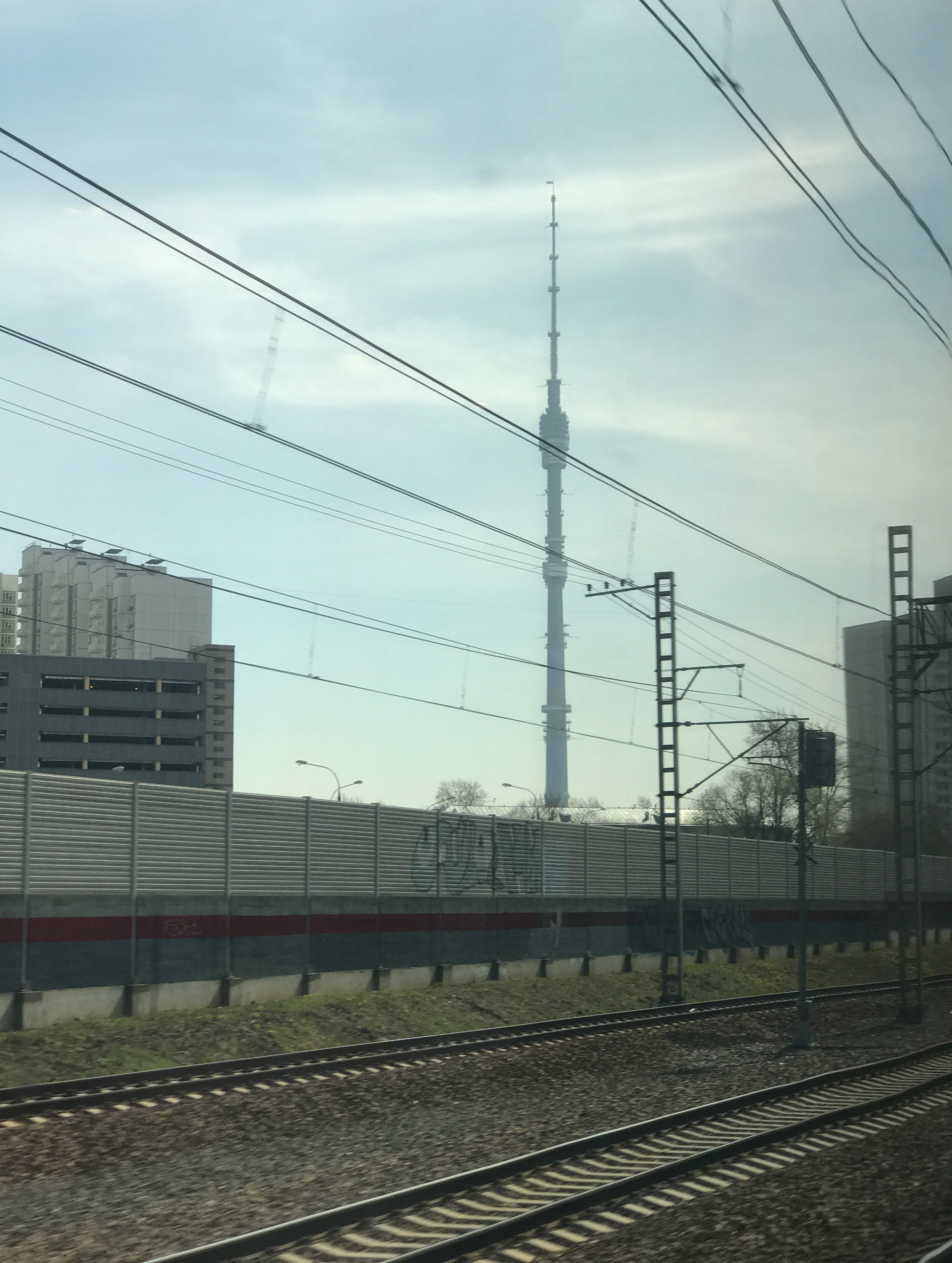 Октябрьская железная дорога